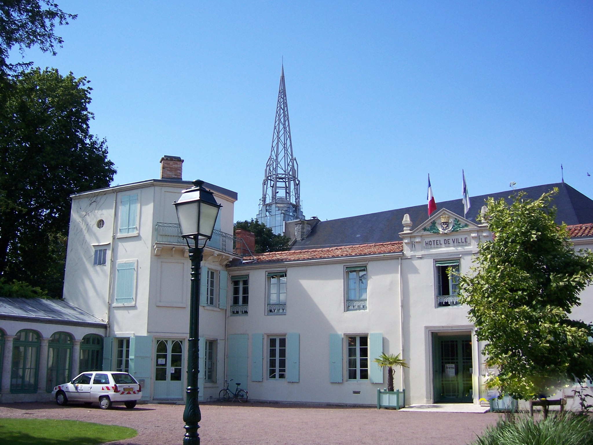 Photo de la mairie de Marans avec vue du clocher métallique derrière